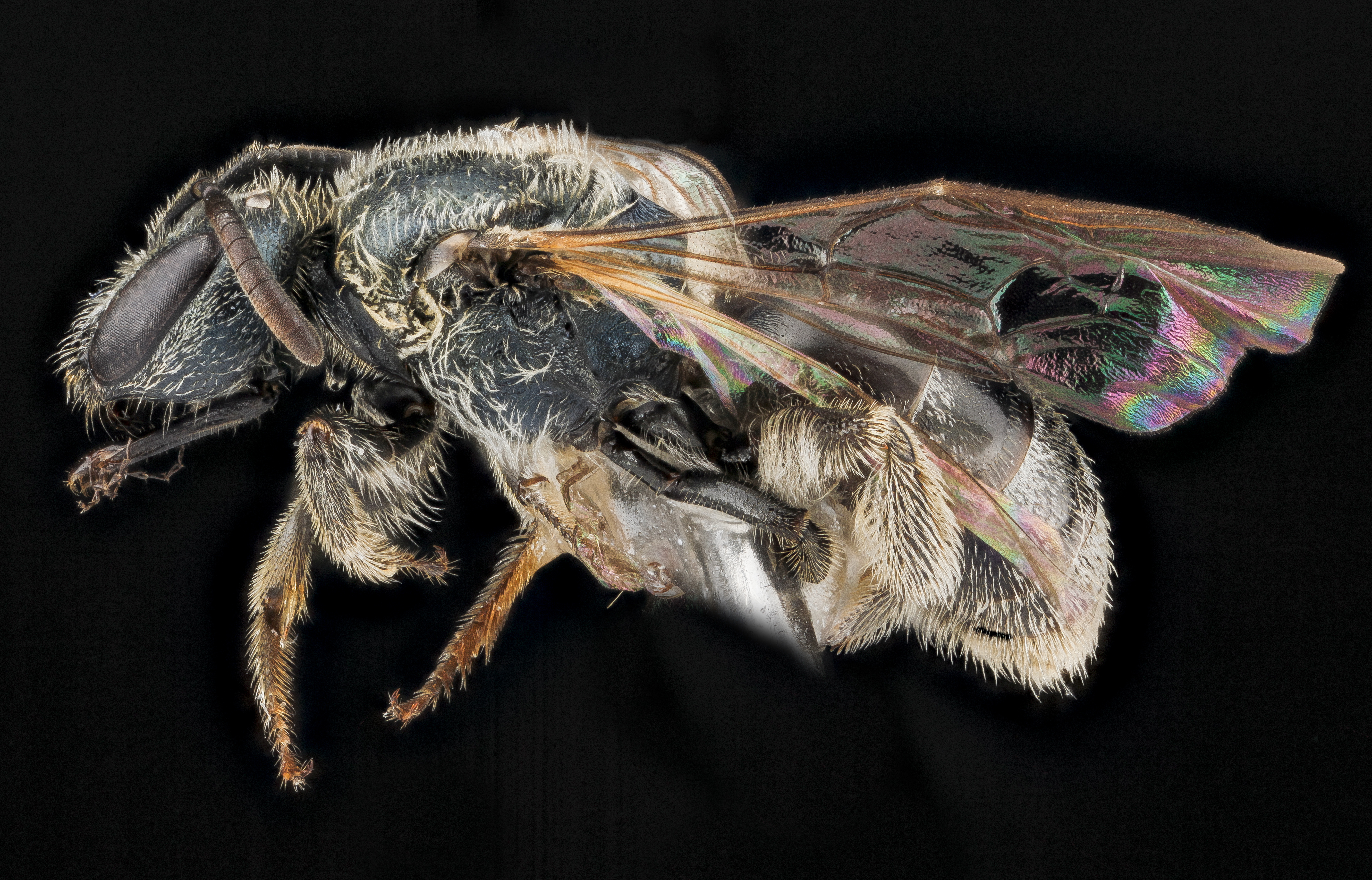 Lasioglossum laevissimum, F, side, Montana_2012-10-15-16.26.28 ZS PMax